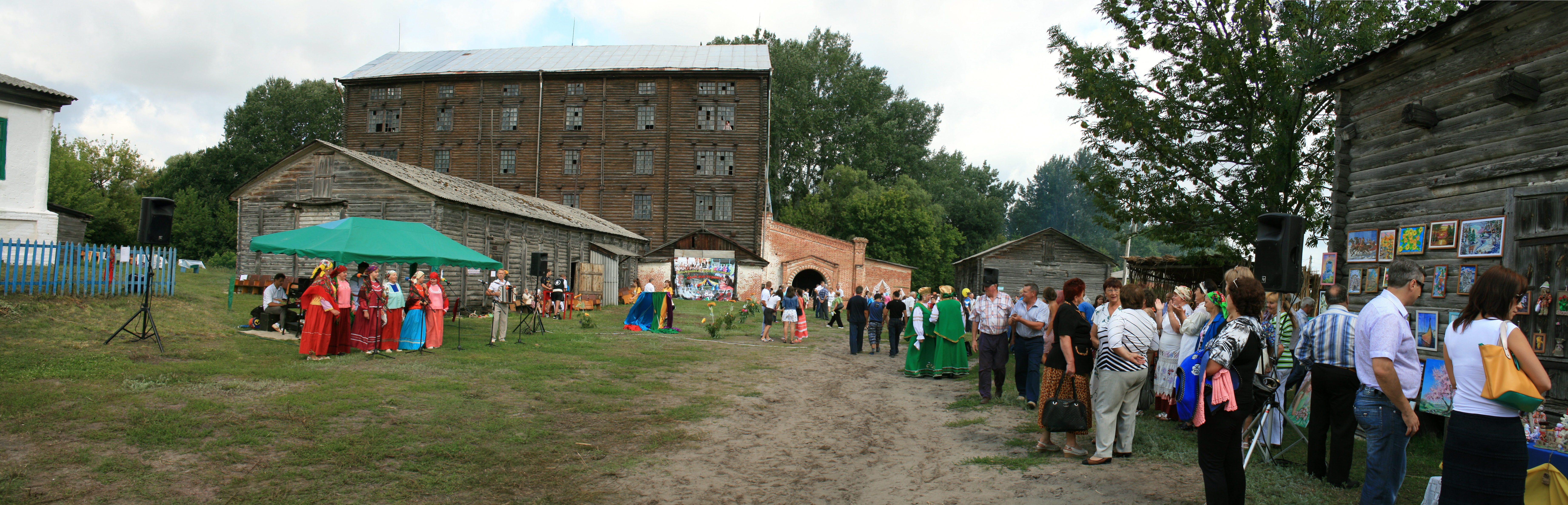 1-й межрайонный фестиваль-состязание «Я — русский крестьянин». Село Новоивановка, Волоконовский район Белгородской области.